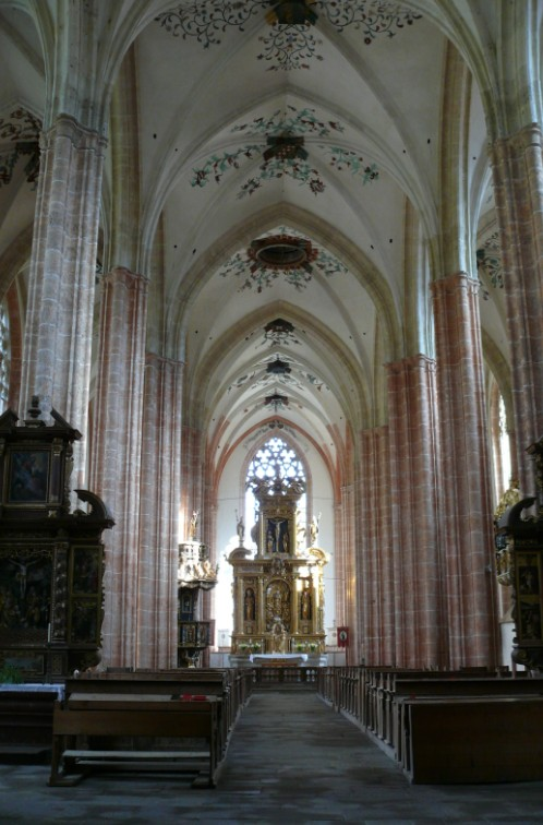 Klášter Neuberg